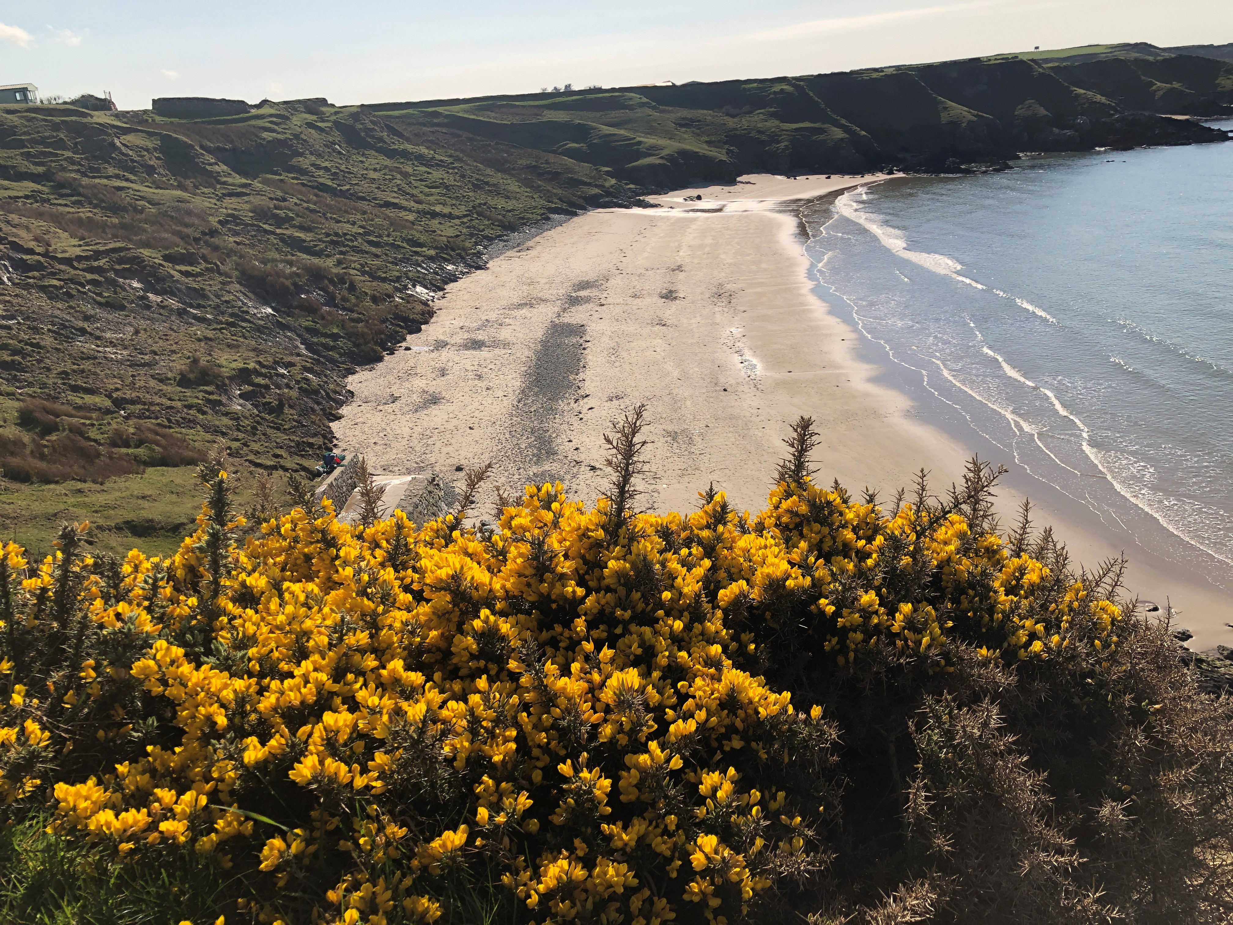 Glan 'mor / traeth Tywyn